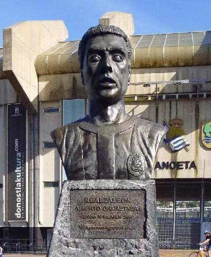 San Sebastián - Estadio de Anoeta